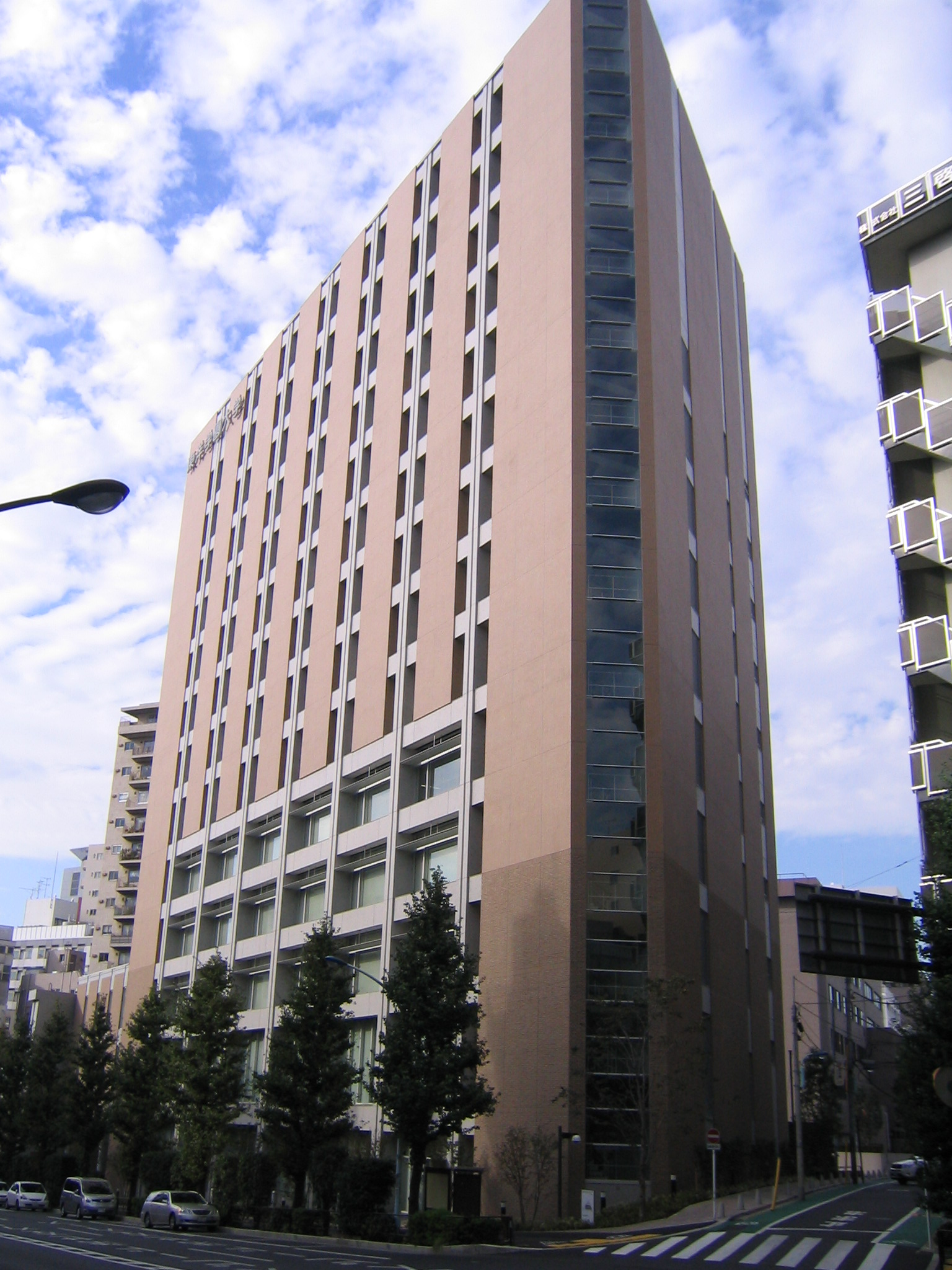 東洋学園大学本郷キャンパス